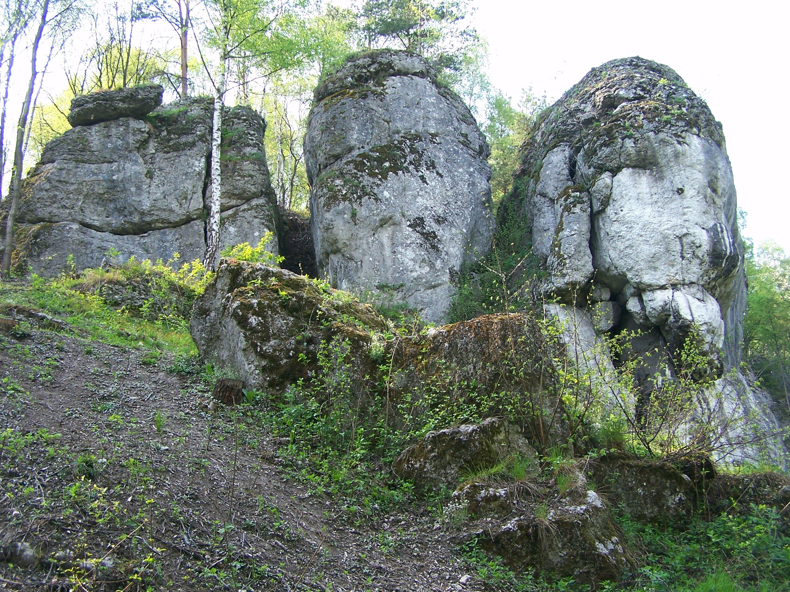 Dolina Brzoskwinki (Garb Tenczyński). Skała Artystów i Mysiura.